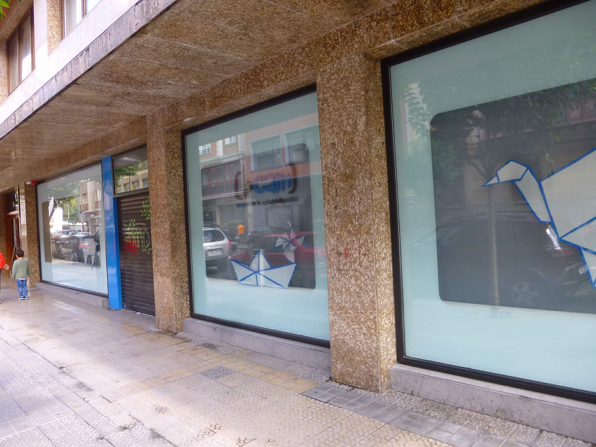 Basque Center for Applied Mathematics (BCAM), en Bilbao